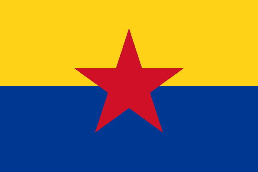 Bandera del Movimiento Revolucionario del Pueblo (Colombia)